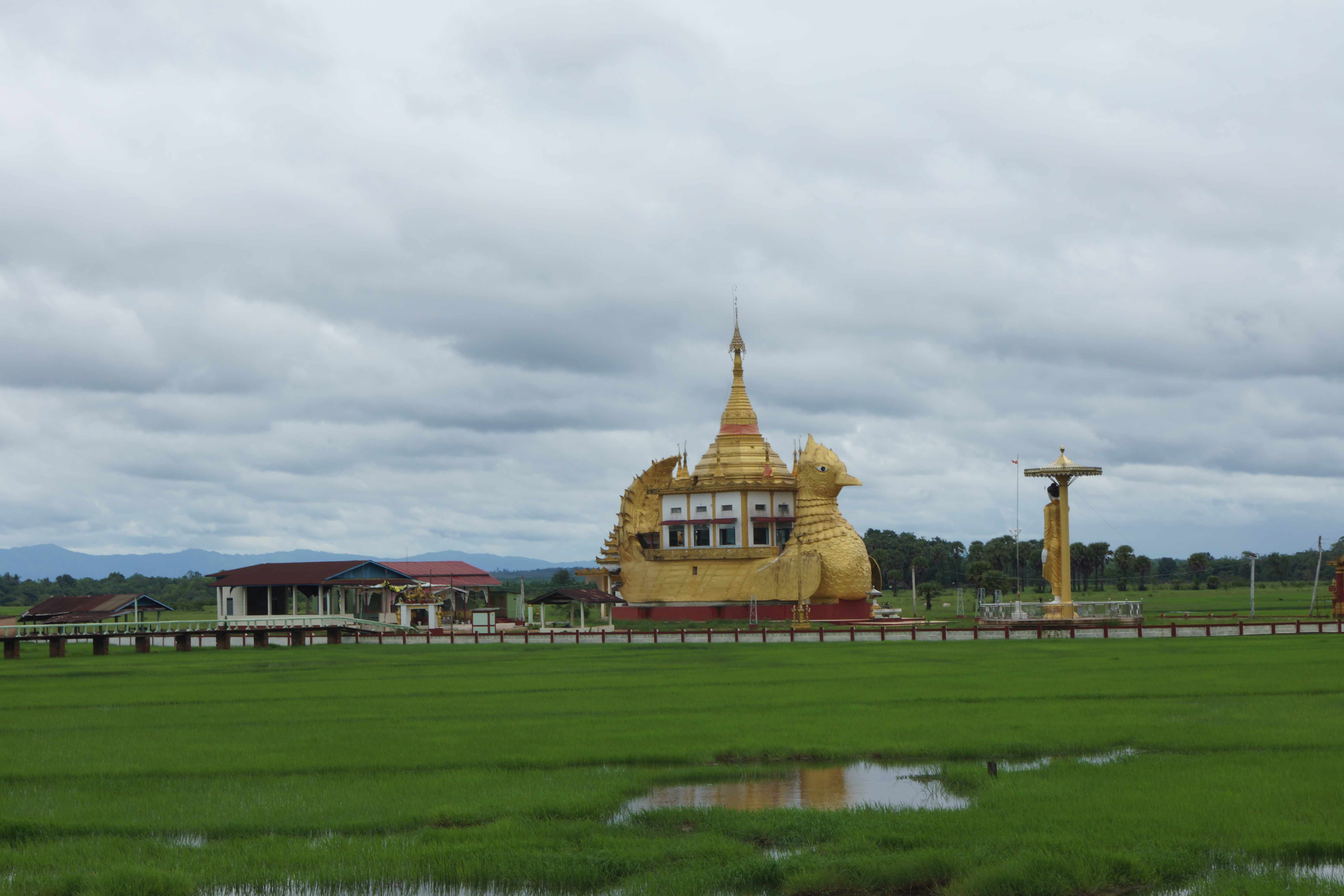 Kawkareik, Myanmar (Burma)